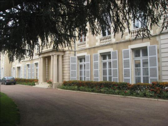 Les extérieurs de la préfecture de Nevers